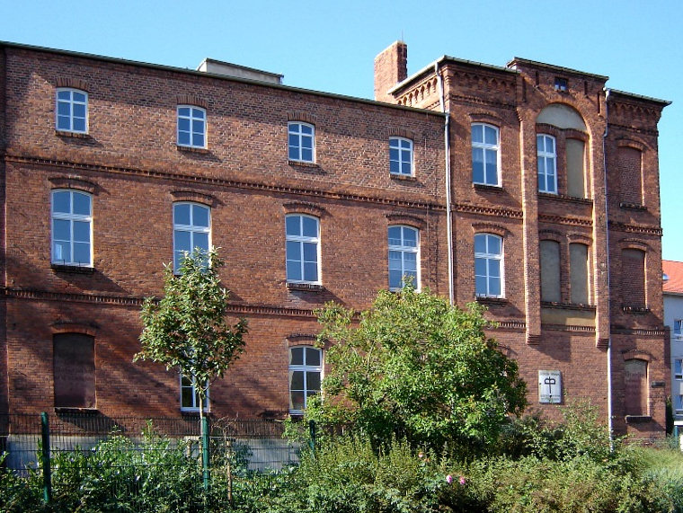 Pfeiffersche Stiftungen Magdeburg (Germany)